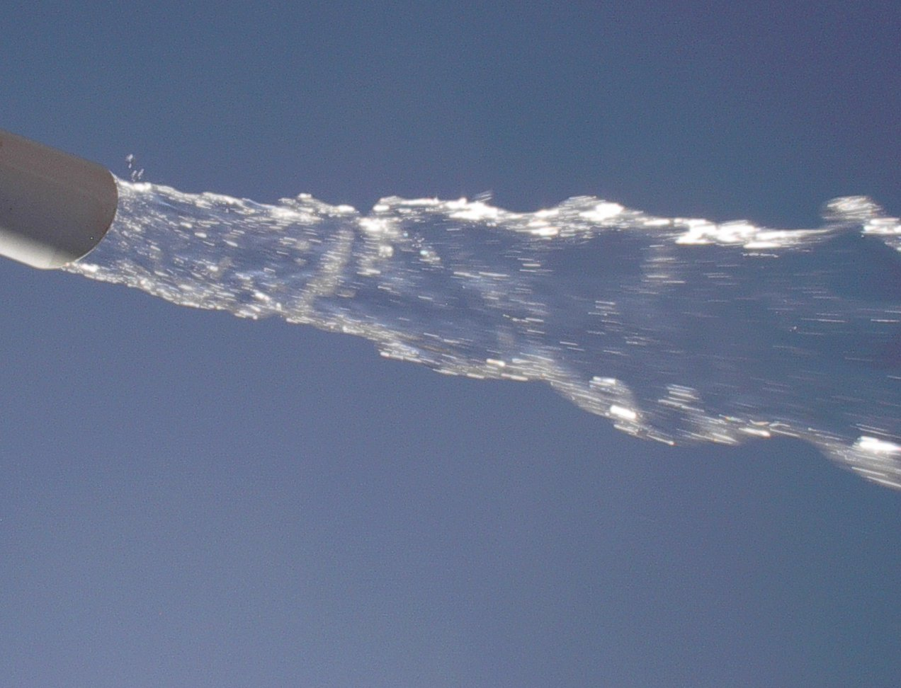 Water leaving a metal nozzle.